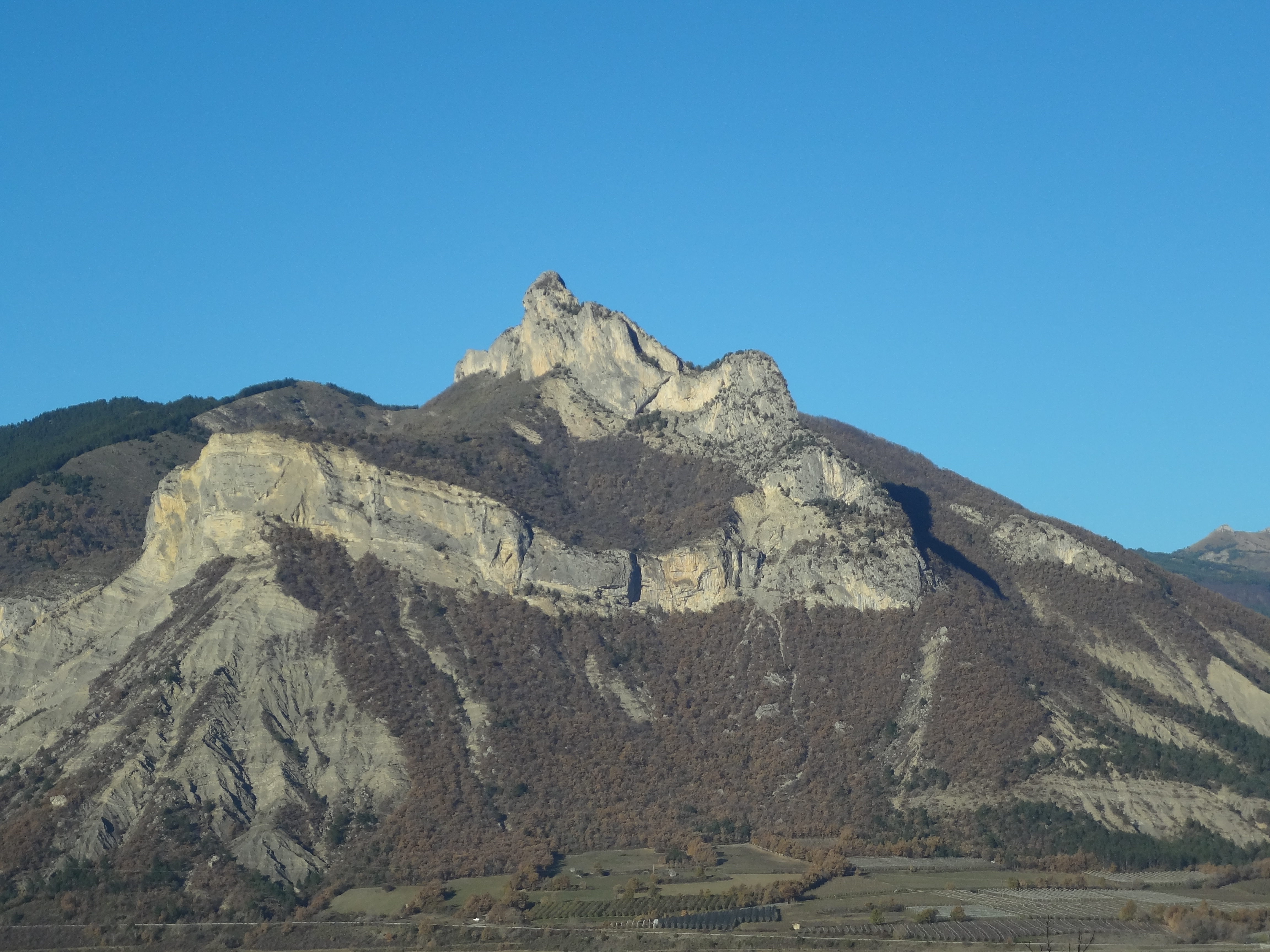 Pic de Crigne : 1263 m